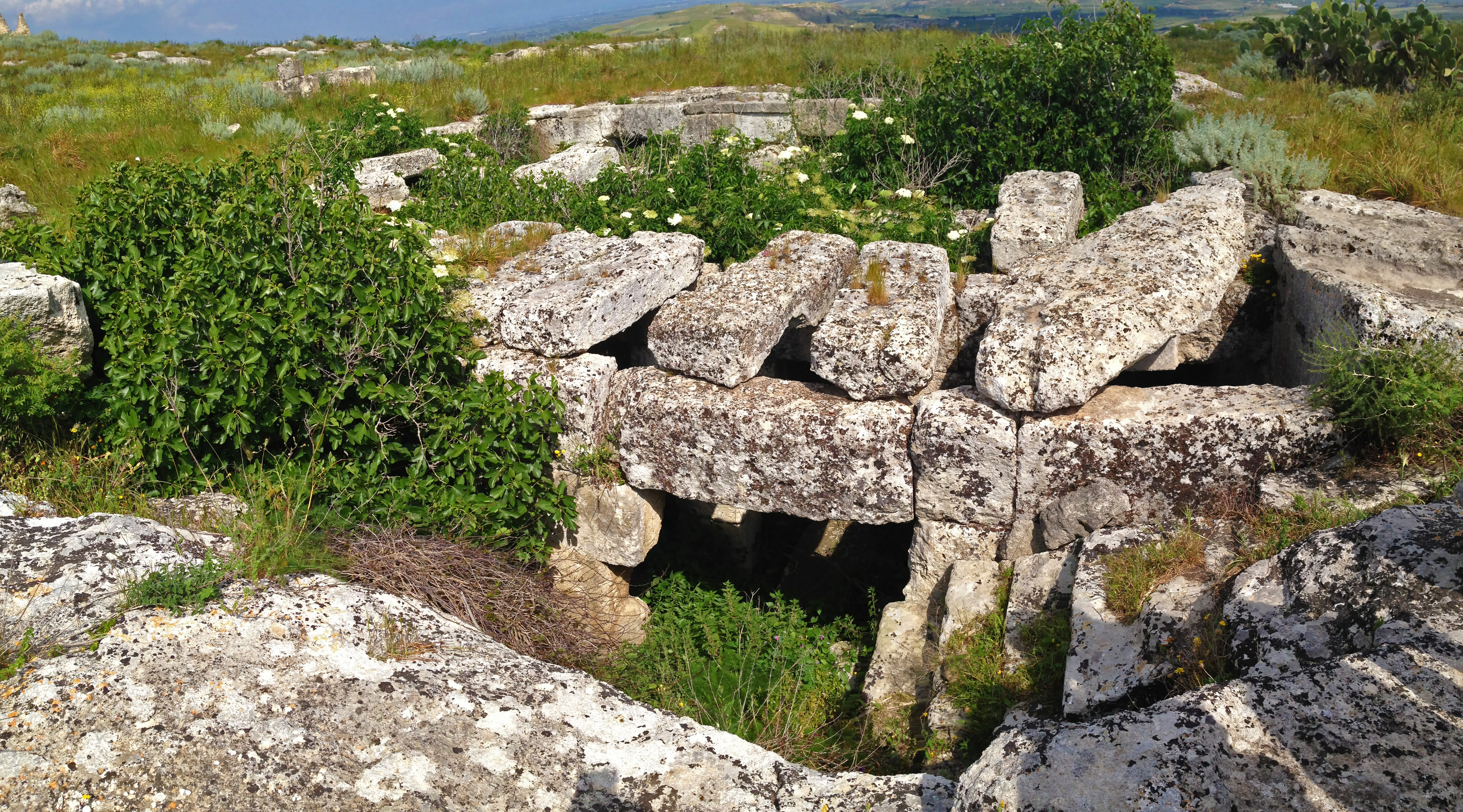 Colonne san Basilio, veduta superiore